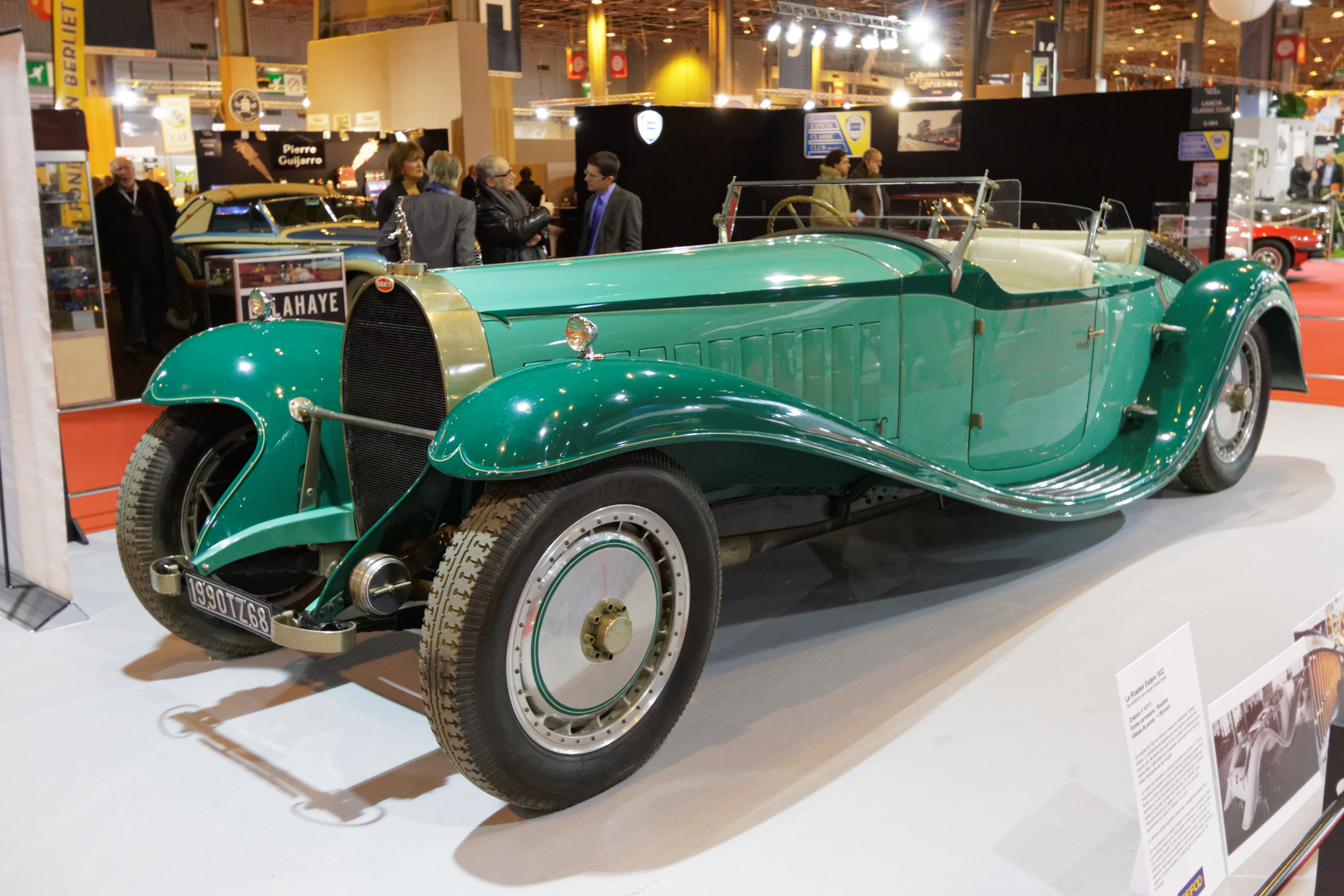 Une des voiture présentée lors du salon Rétromobile de Paris 2015